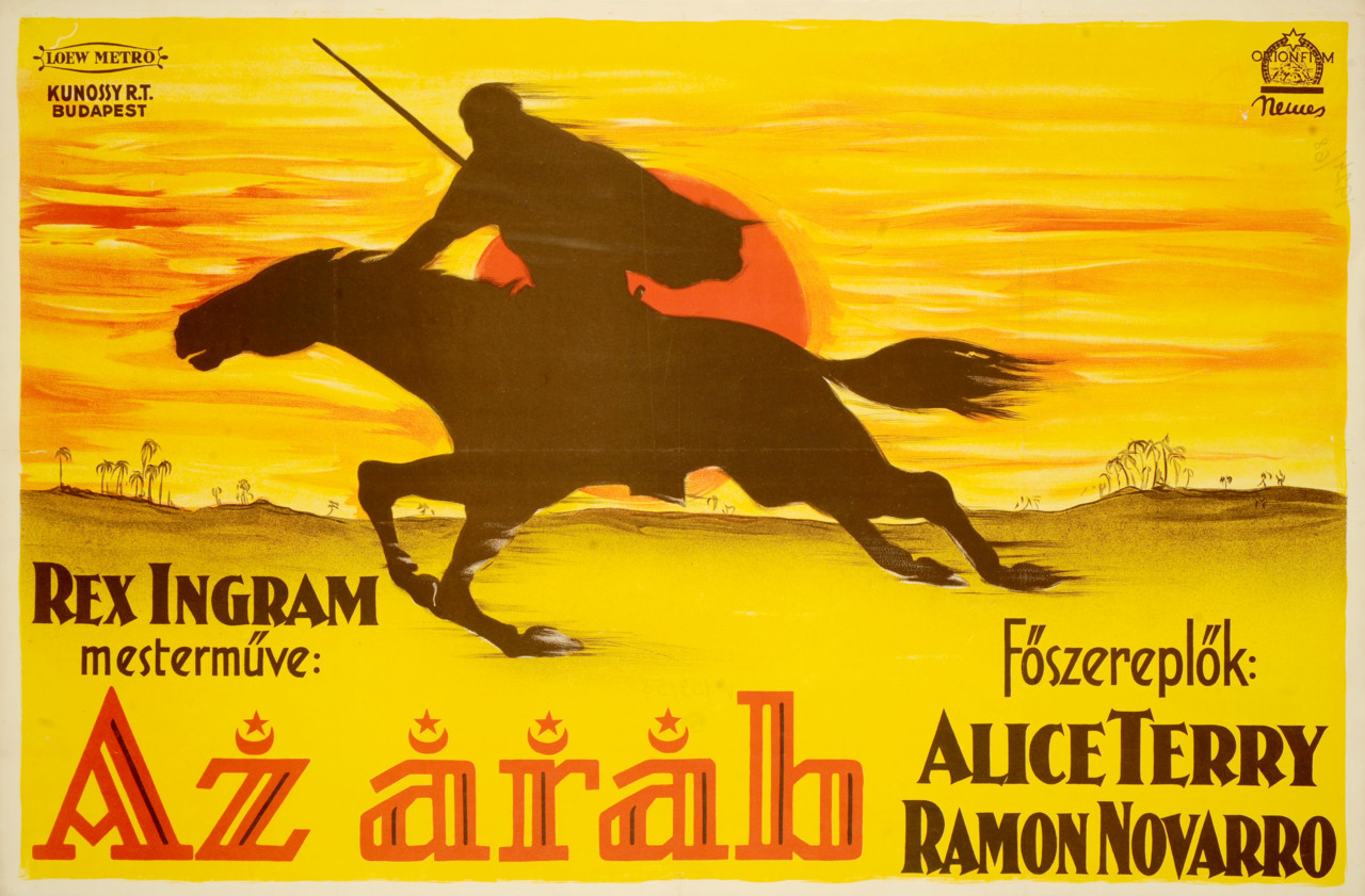 Az arab című 1924-es amerikai némafilm magyarországi plakátja